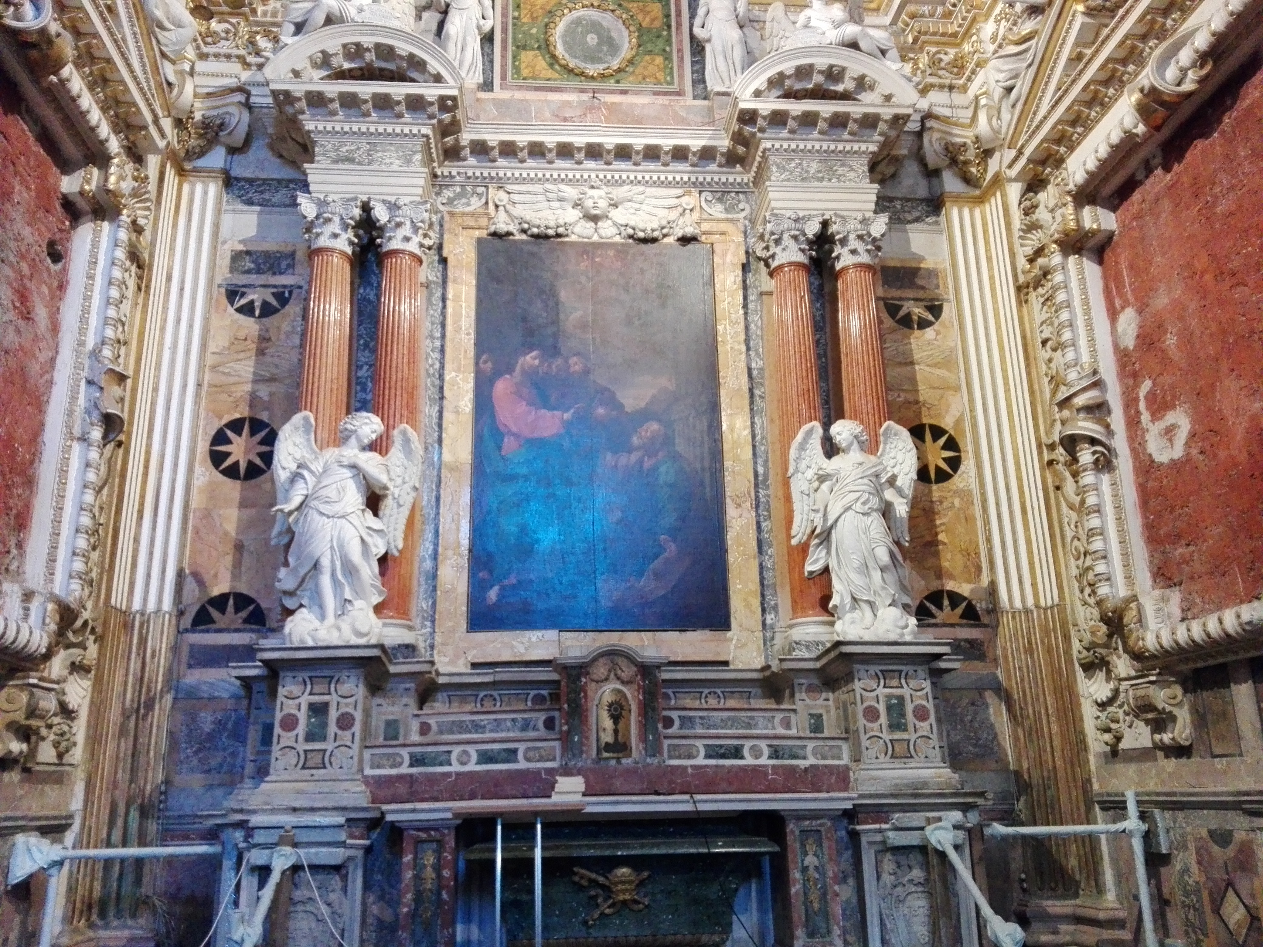 Chiesa